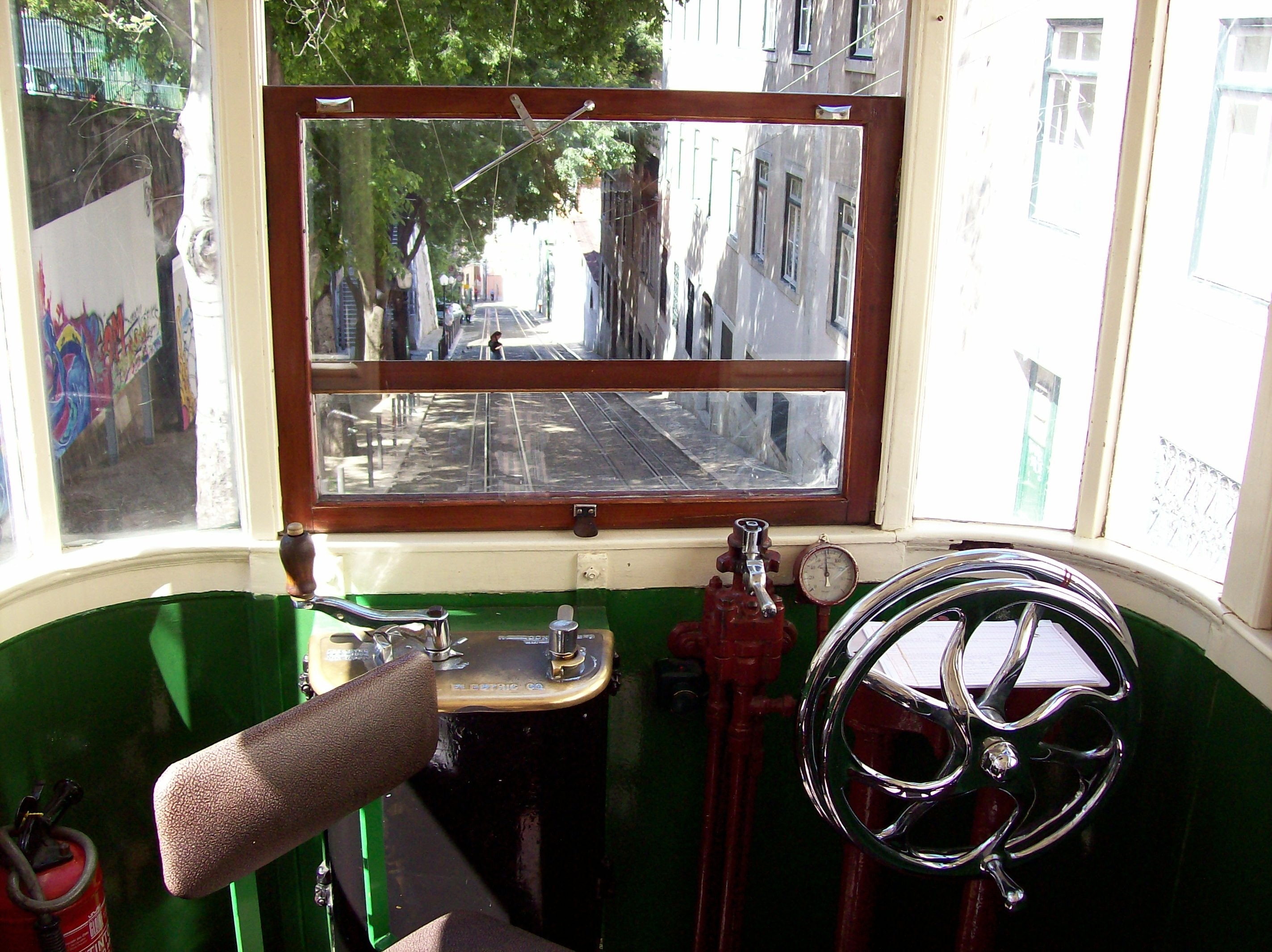 Elevador da Glória, Steuerung, Lissabon (Portugal) im Mai 2009